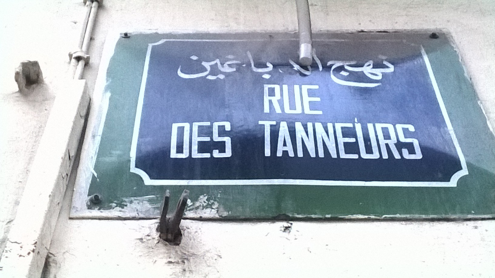 Tunis